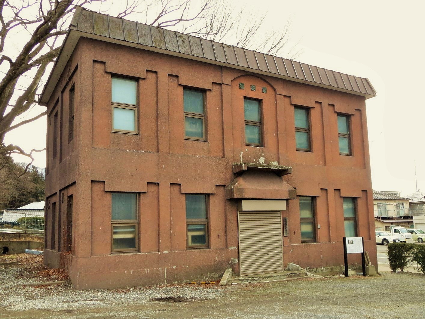 国登録文化財・遠野宝物館 Canon IXY 3